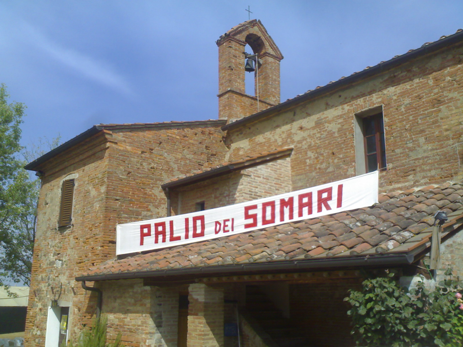 Chiesa della Maestà del Ponte di Montepulciano Stazione (Siena)